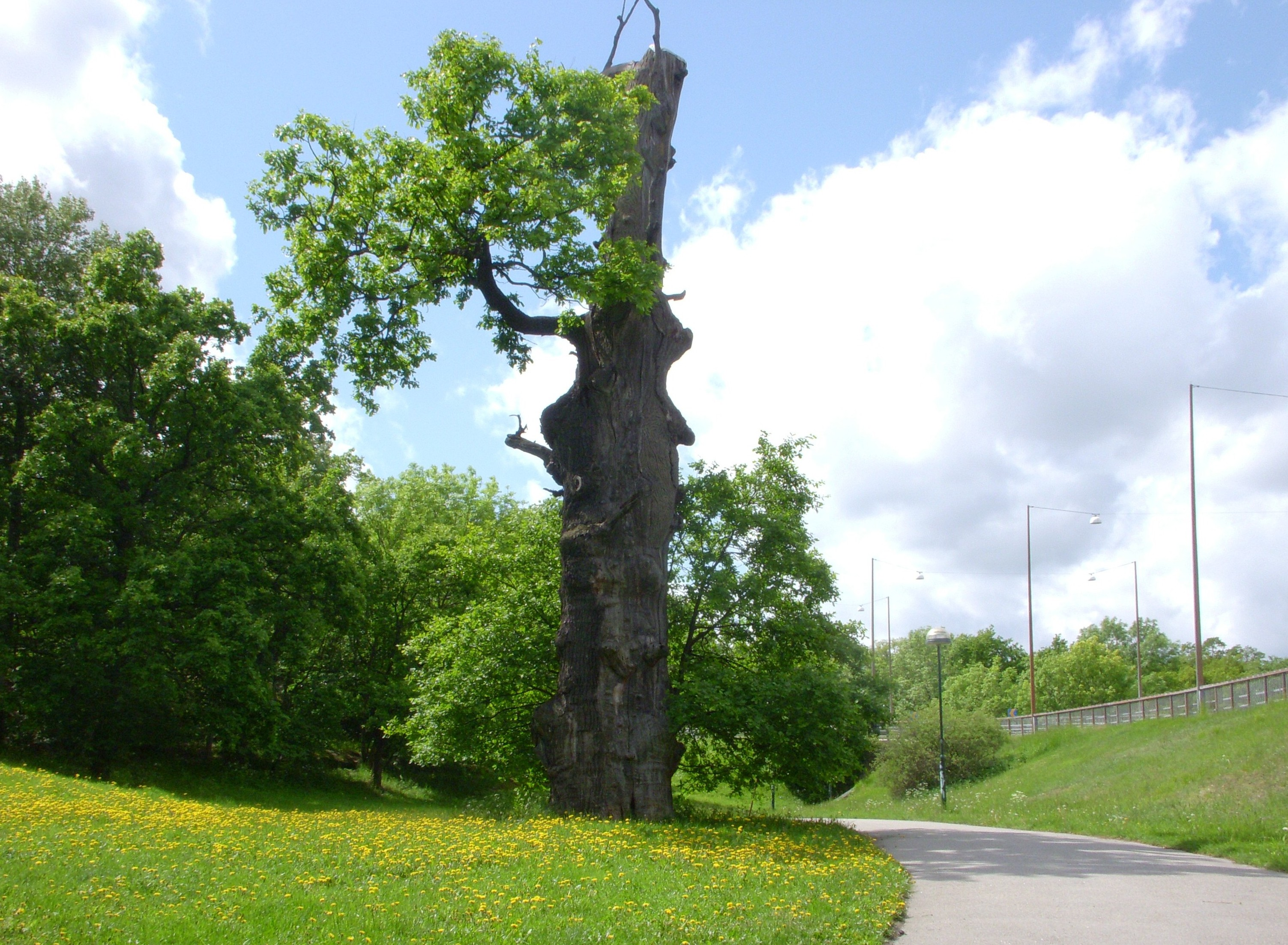 Birger jarls ek, den uppåt 800-åriga eken invid Essingeleden på Kungsholmen/Kristineberg